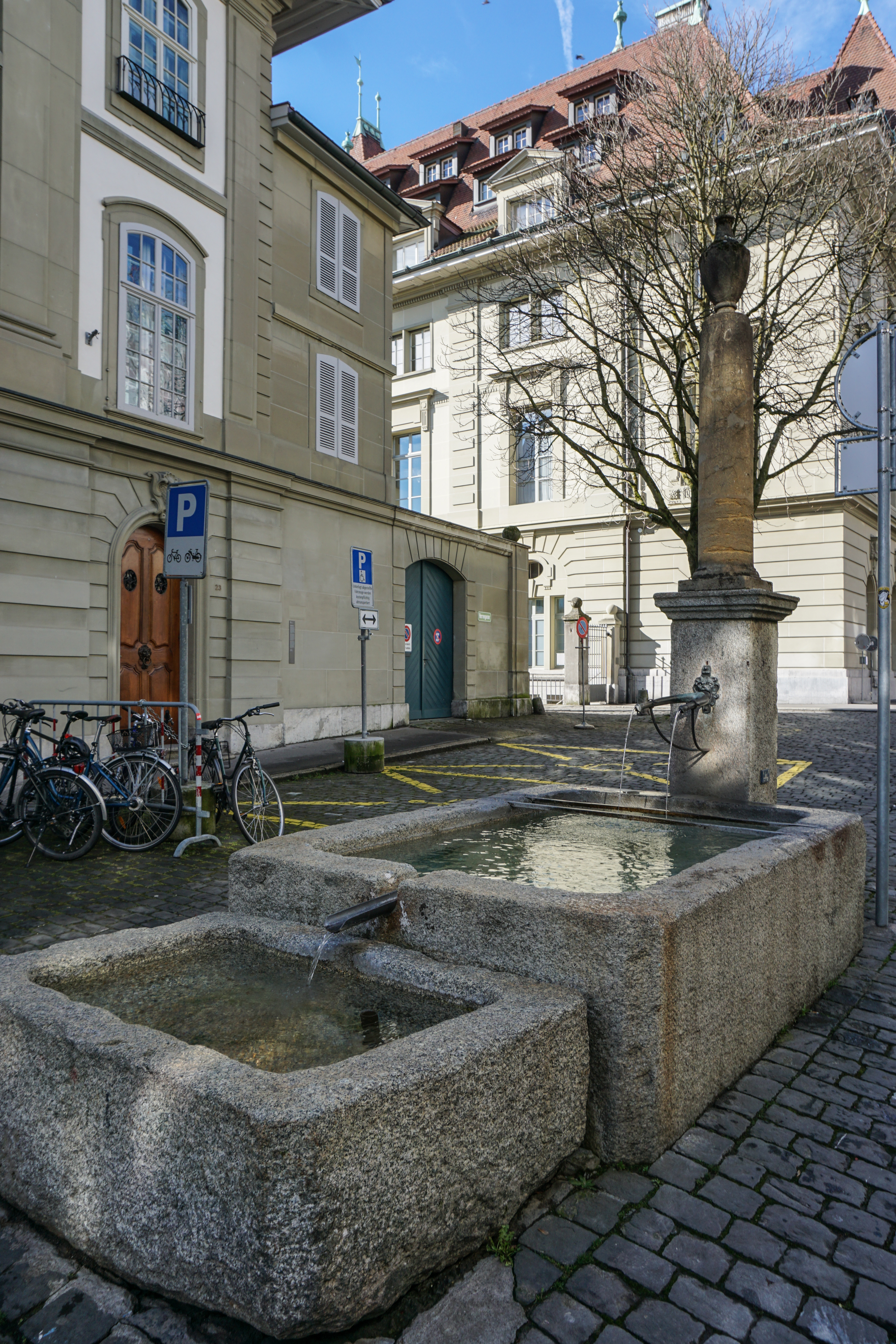 Brunnen vor Haus Herrengasse 23, Tröge 1740/1749, Stock und Vase vermutlich von Erasmus Ritter